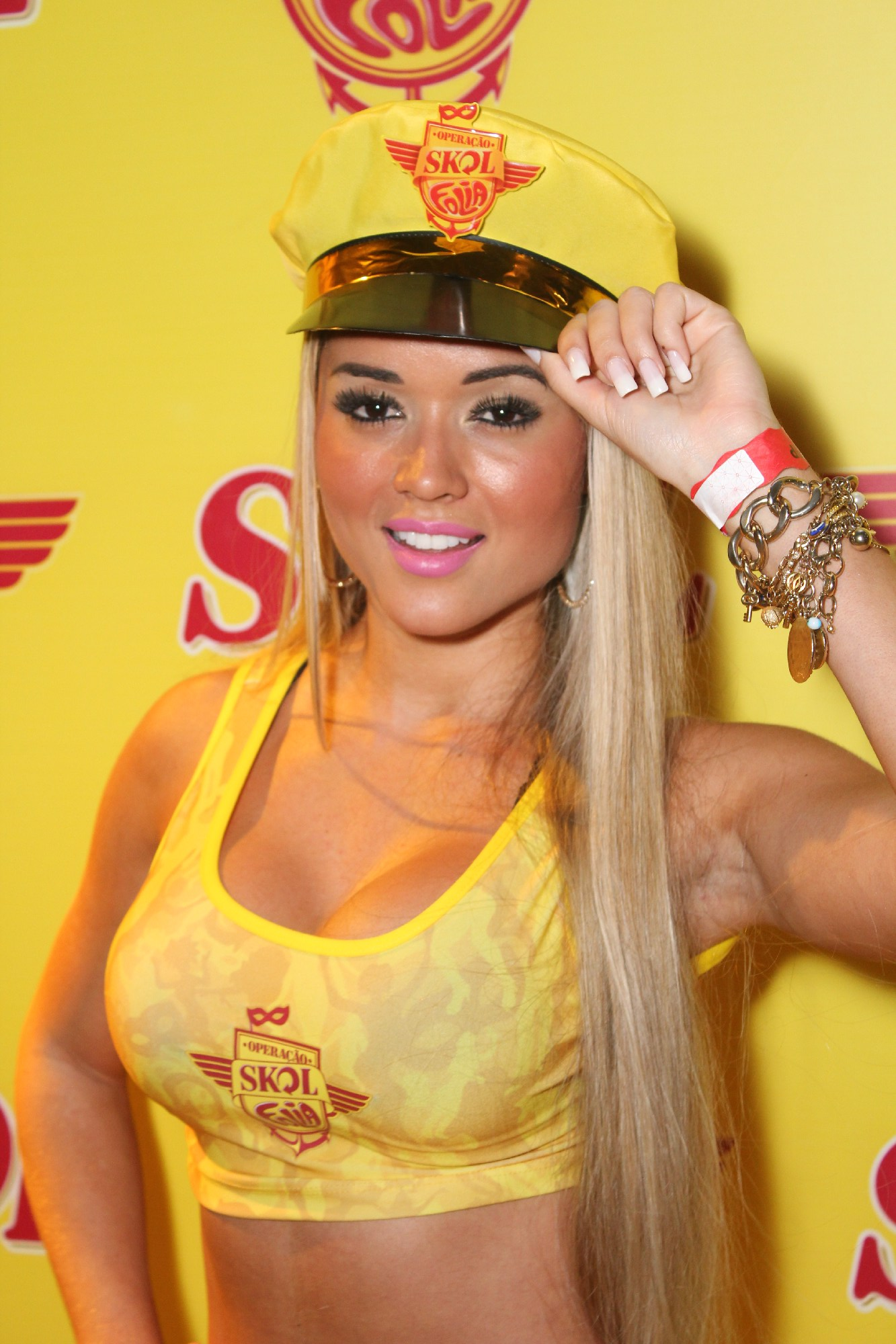 Aryane Steinkopf no Carnaval da Baía 2012